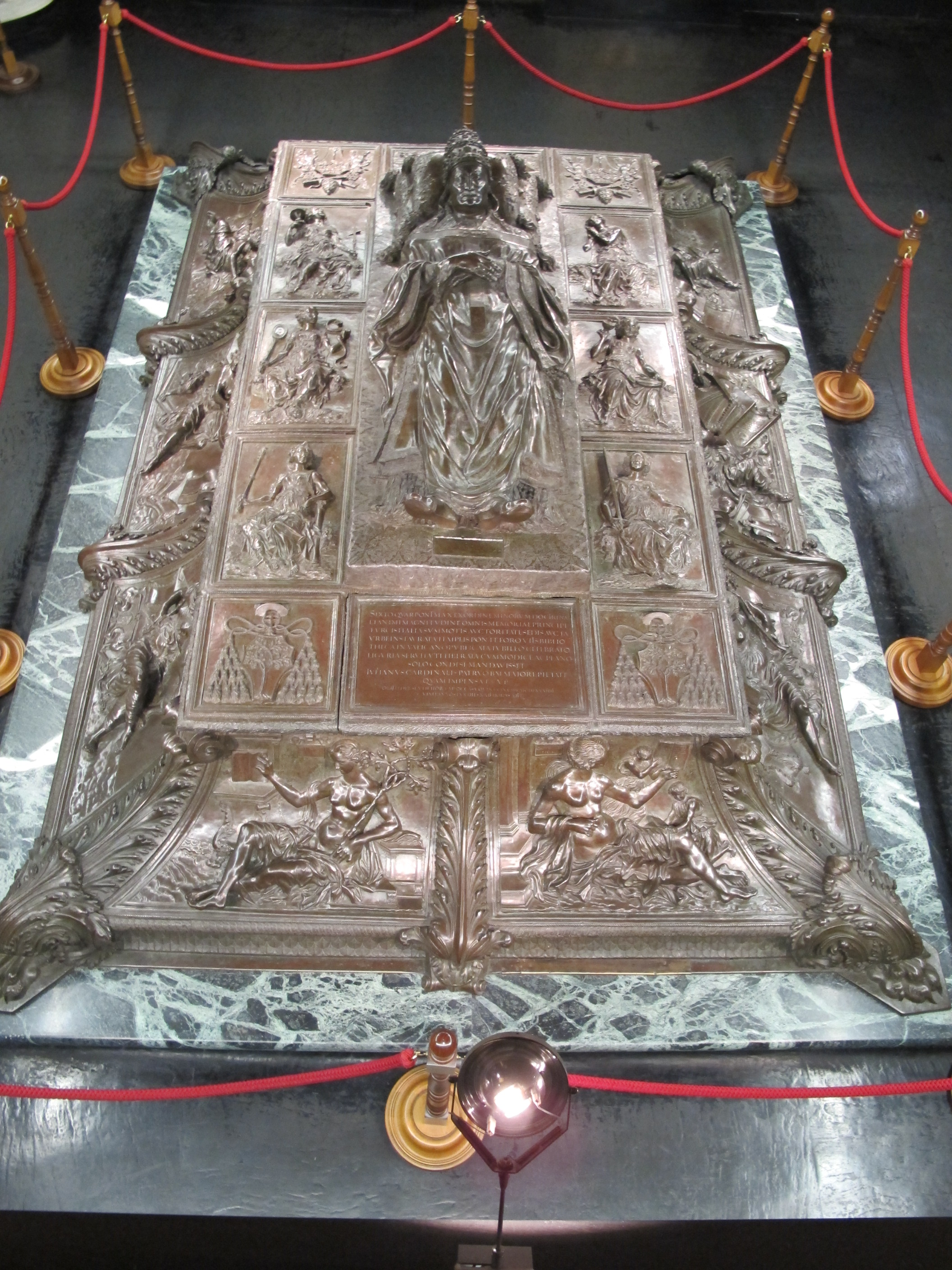 Tesoro di san pietro, tomba di sisto IV di antonio del pollaiolo